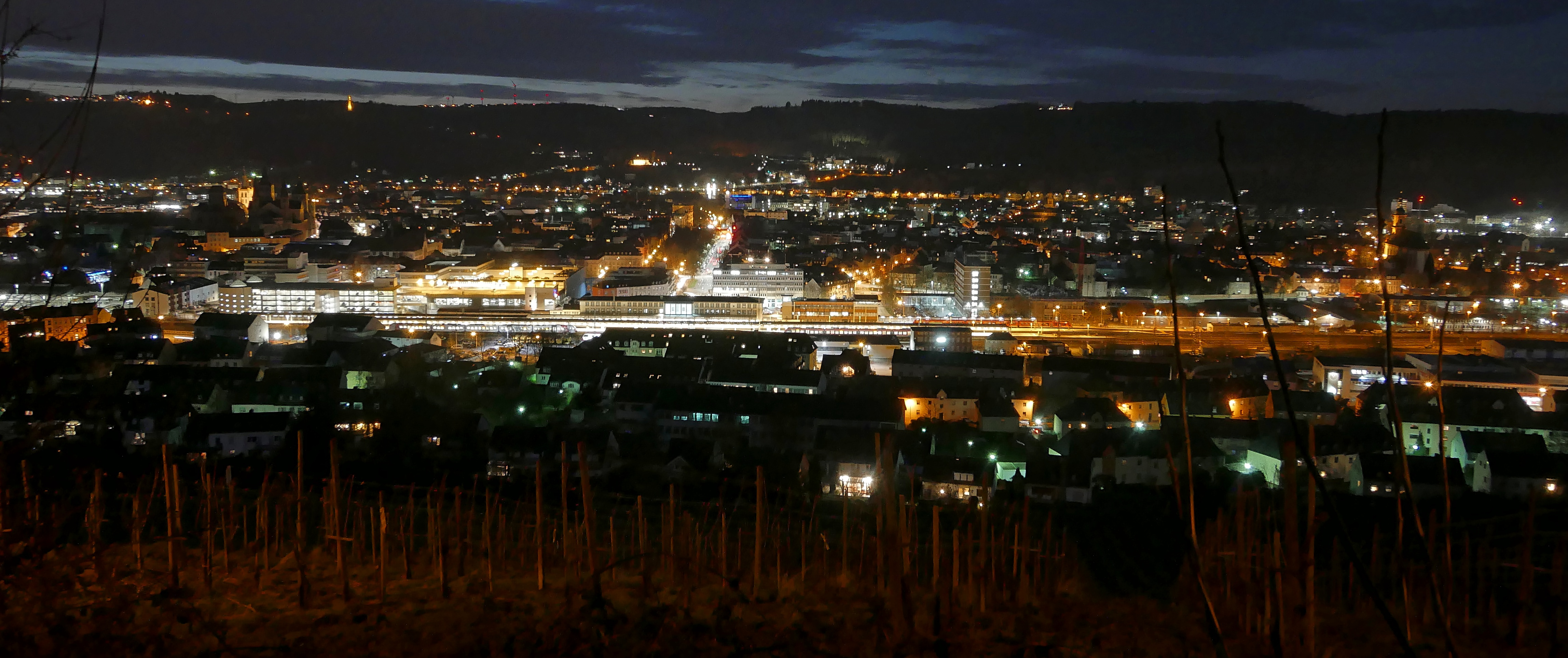 Blick auf Trier vom Kreuzweg auf den Petrisberg - im Vordergrund der Bahnhof, dahinter die Nordalle, Am Horizont links Mariensäule und rechts Restaurant Kockelsberg. Man Sieht dass Liebfrauen, Dom und St. Paulin von der anderen Seite aus angestrahlt sind.